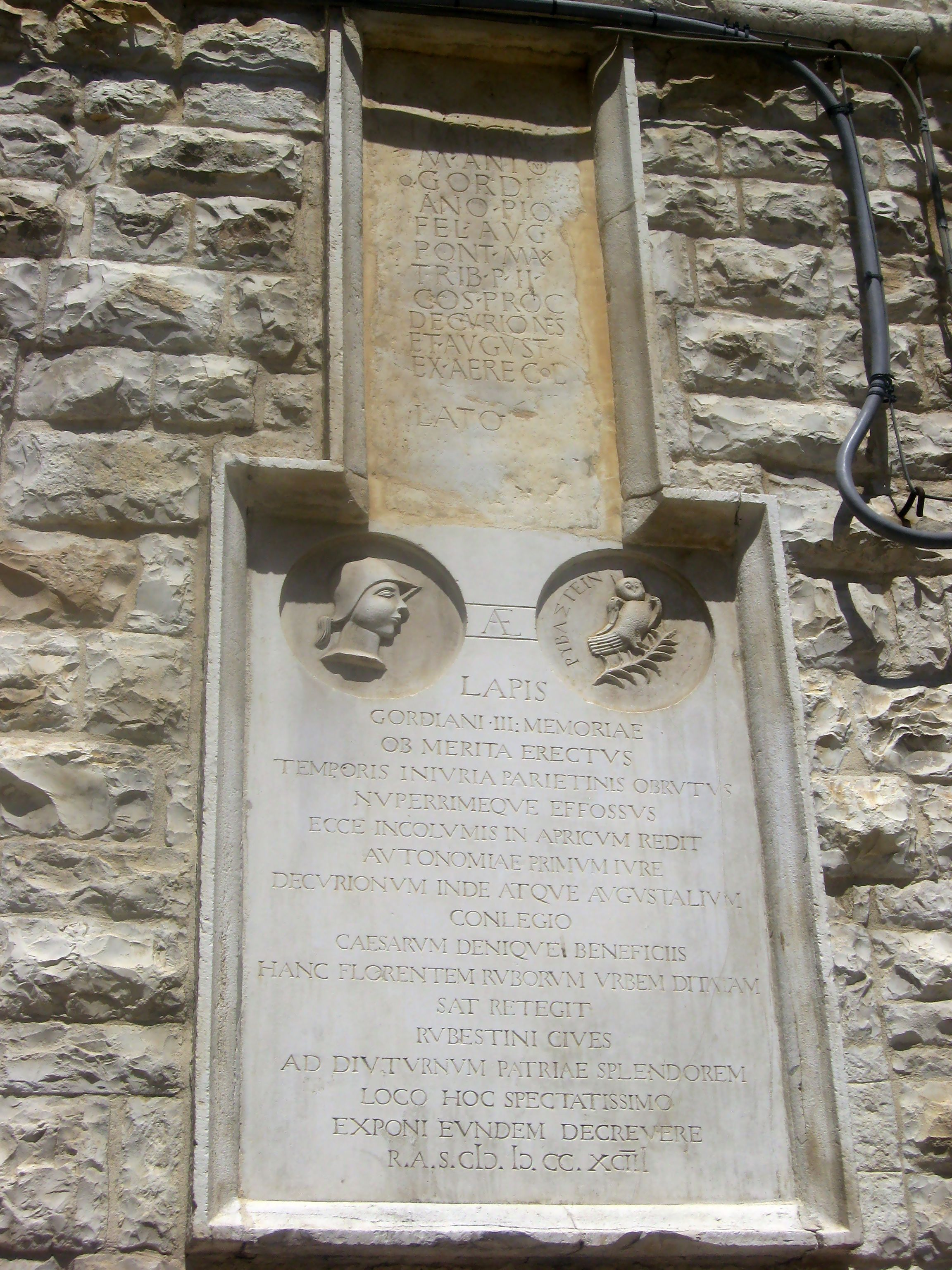 Lapide a Gordiano III, Ruvo di Puglia